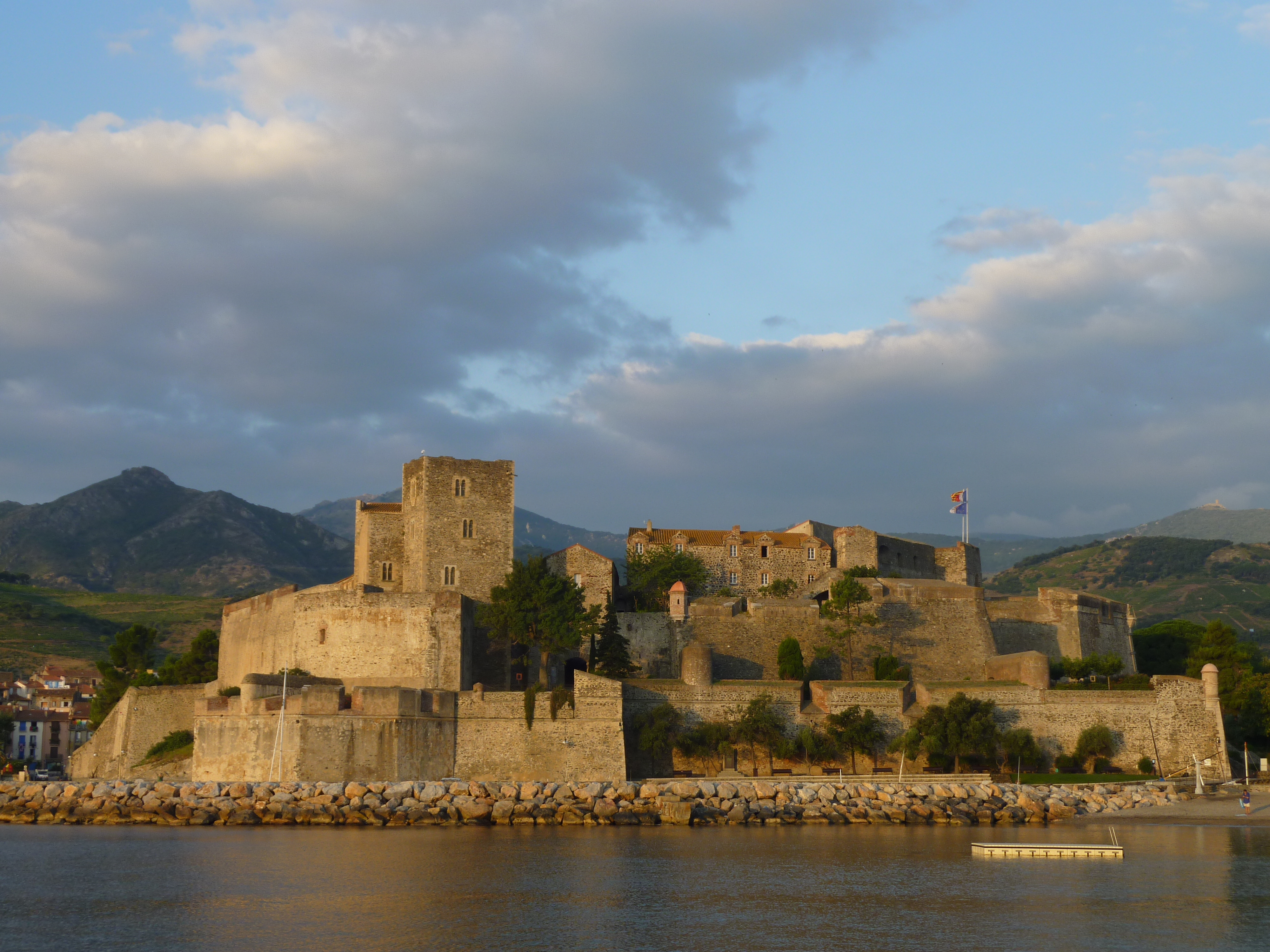 Château royal de Collioure, Pyrénées-Orientales, France. .